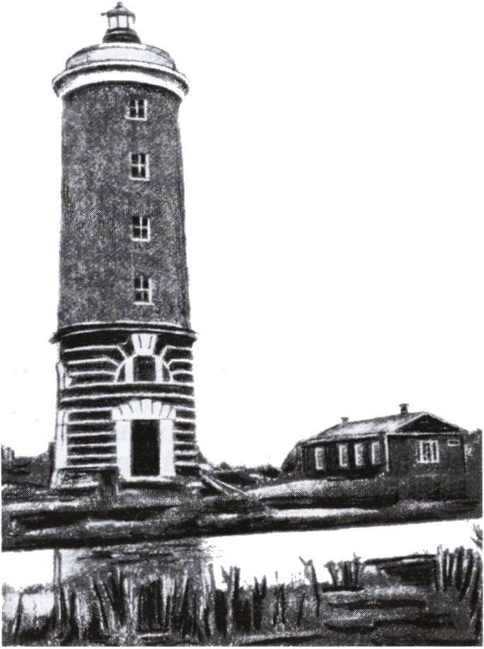 Маяк Мудьюгский. Фото 1913 г.